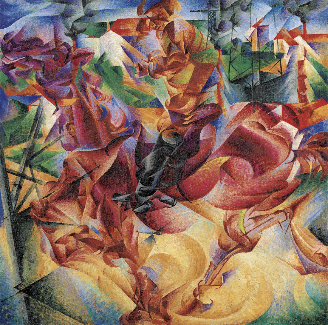 Elasticity (Elasticità)